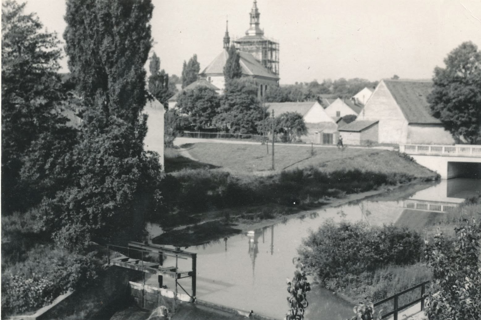 Fricův jez na Hané, bez data, [1967]